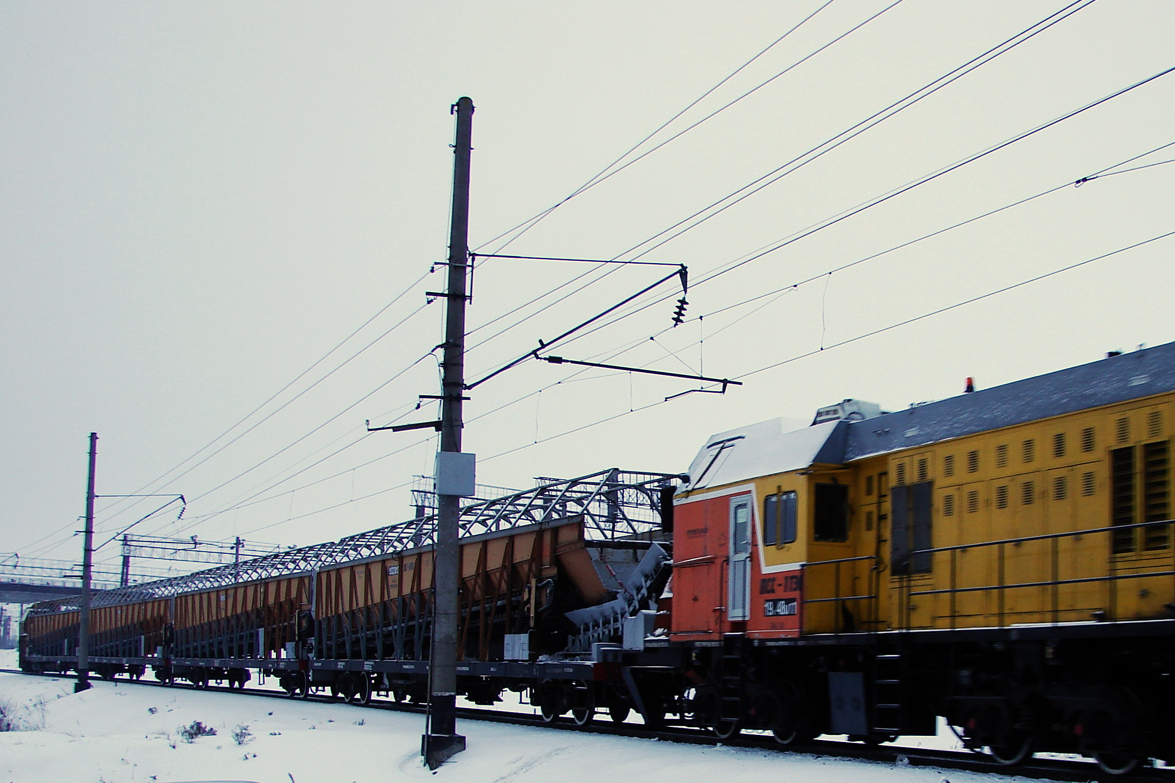 многовагонный снегоуборочный поезд ПСС-113